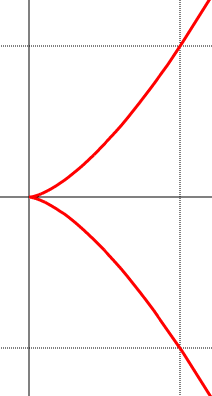 Semicubical parabola